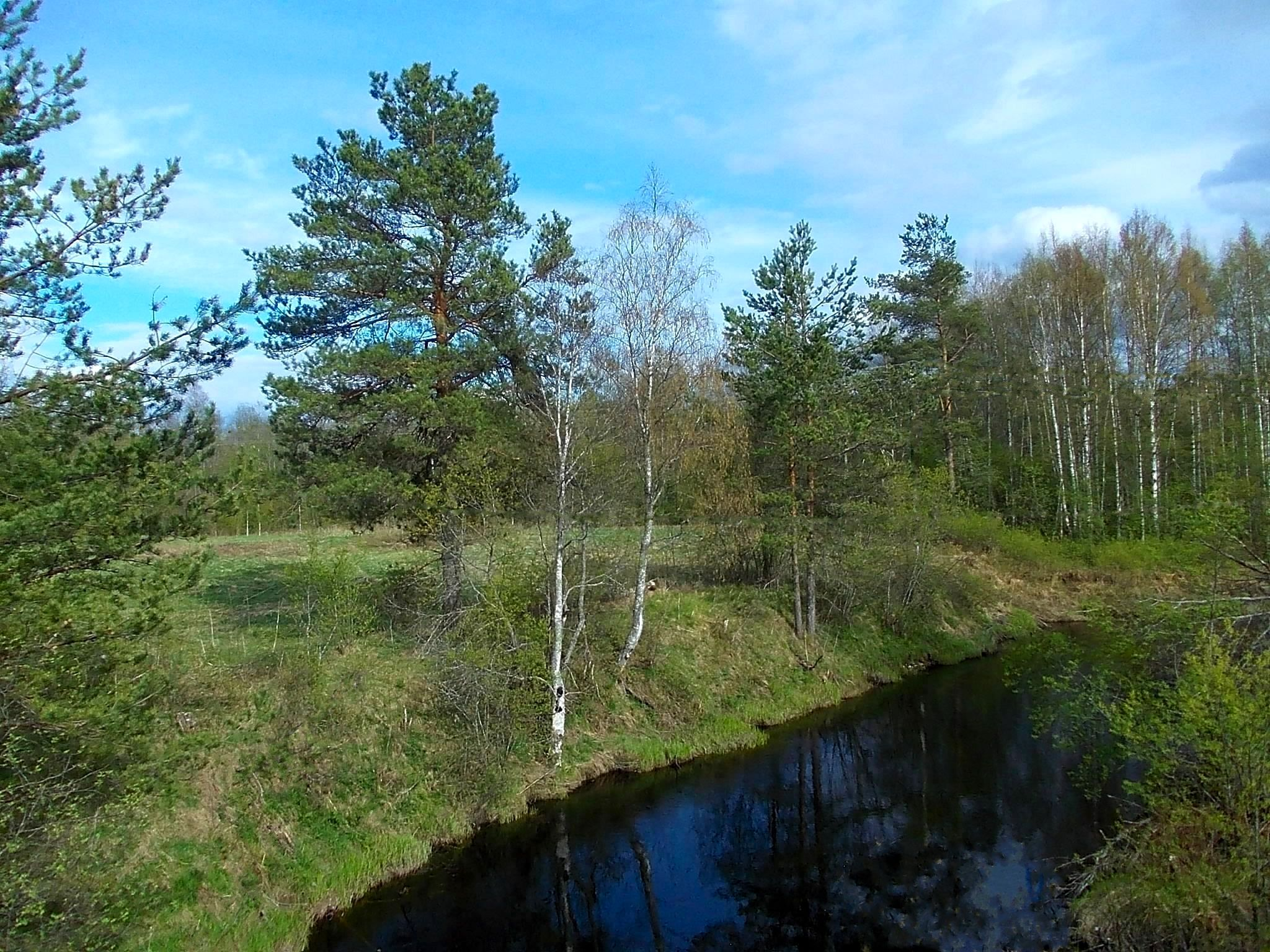 Река Челма недалеко от устья